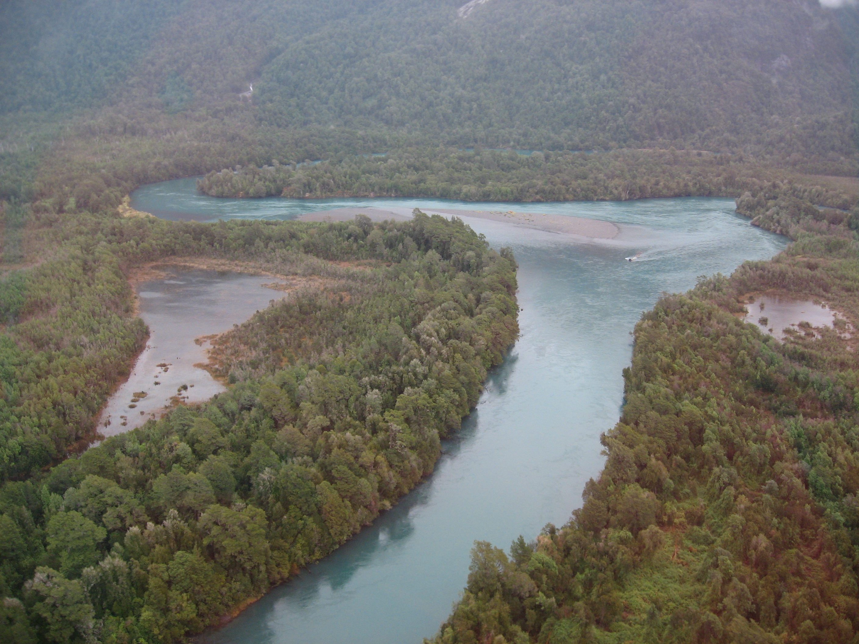 Río Yelcho antes del estuario. Vista aérea. Tiempo lluvioso.